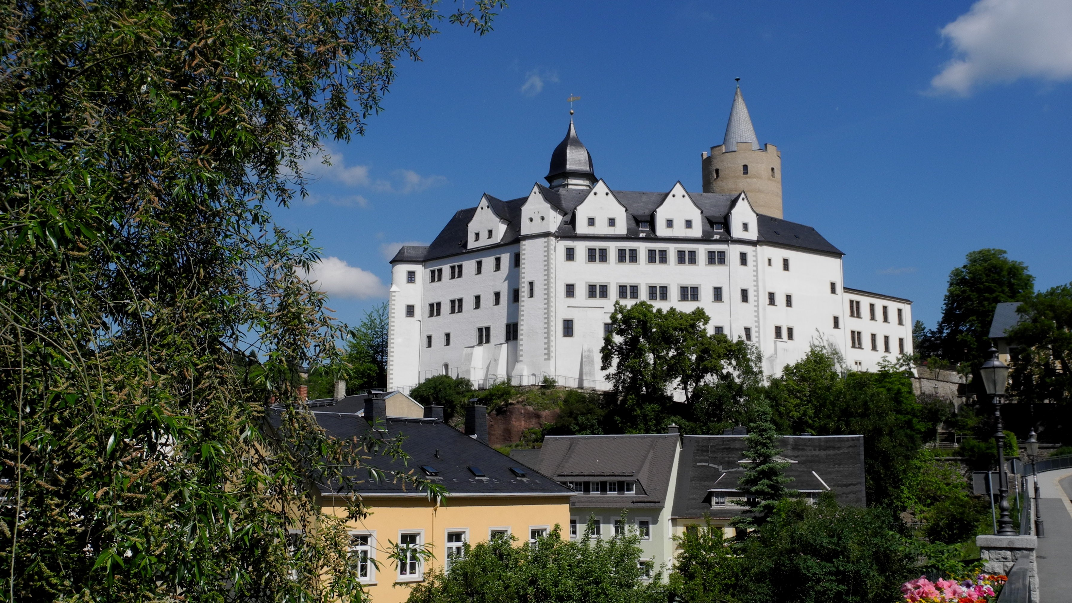 Zschopau - Schloss Wildeck ab 13. Jh